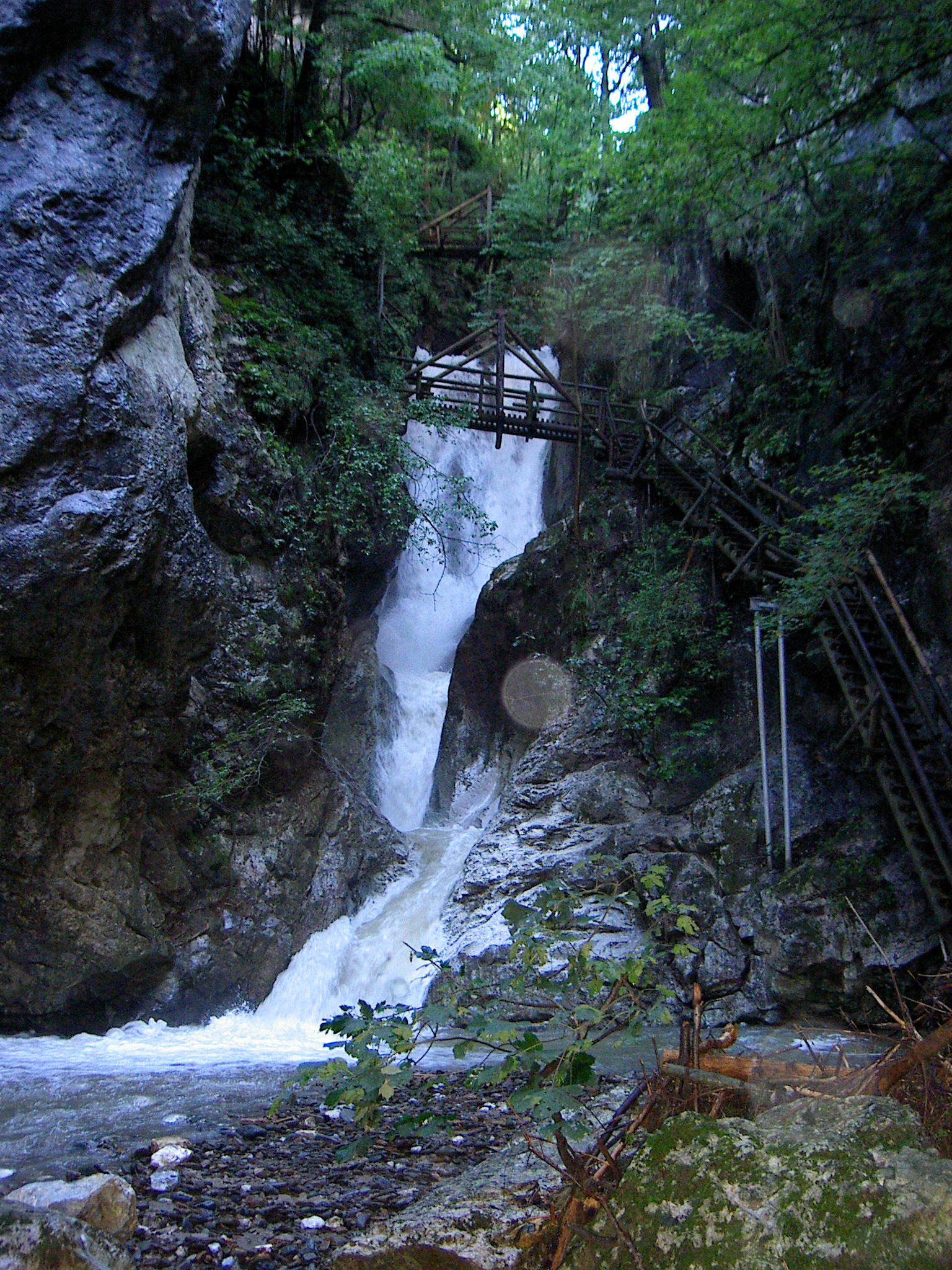 Kesselfallklamm in Semriach, Styria, Austria